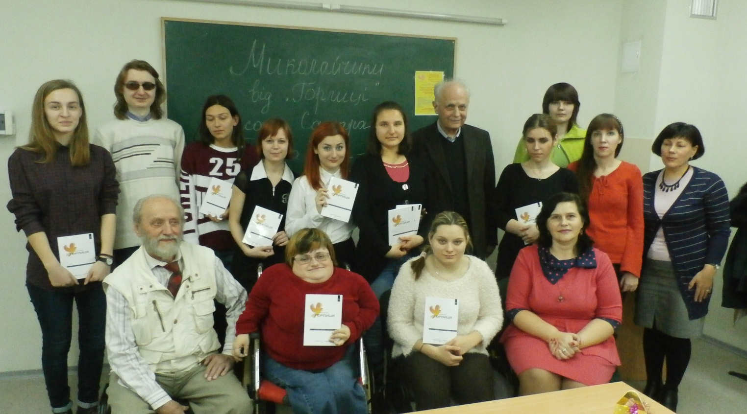 Учасники літературної студії «Гролиця»